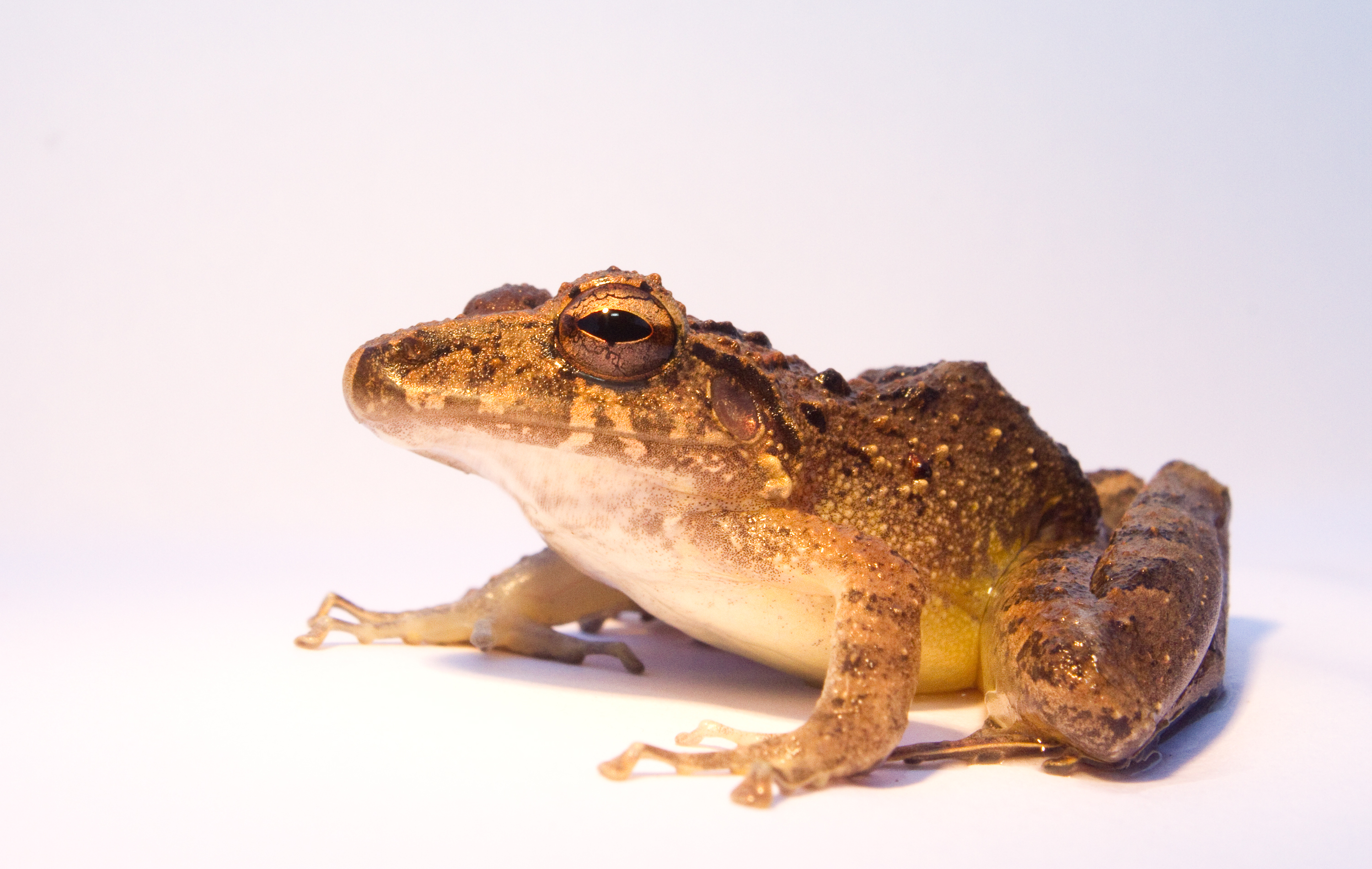 Craugastor crassidigitus, Panama